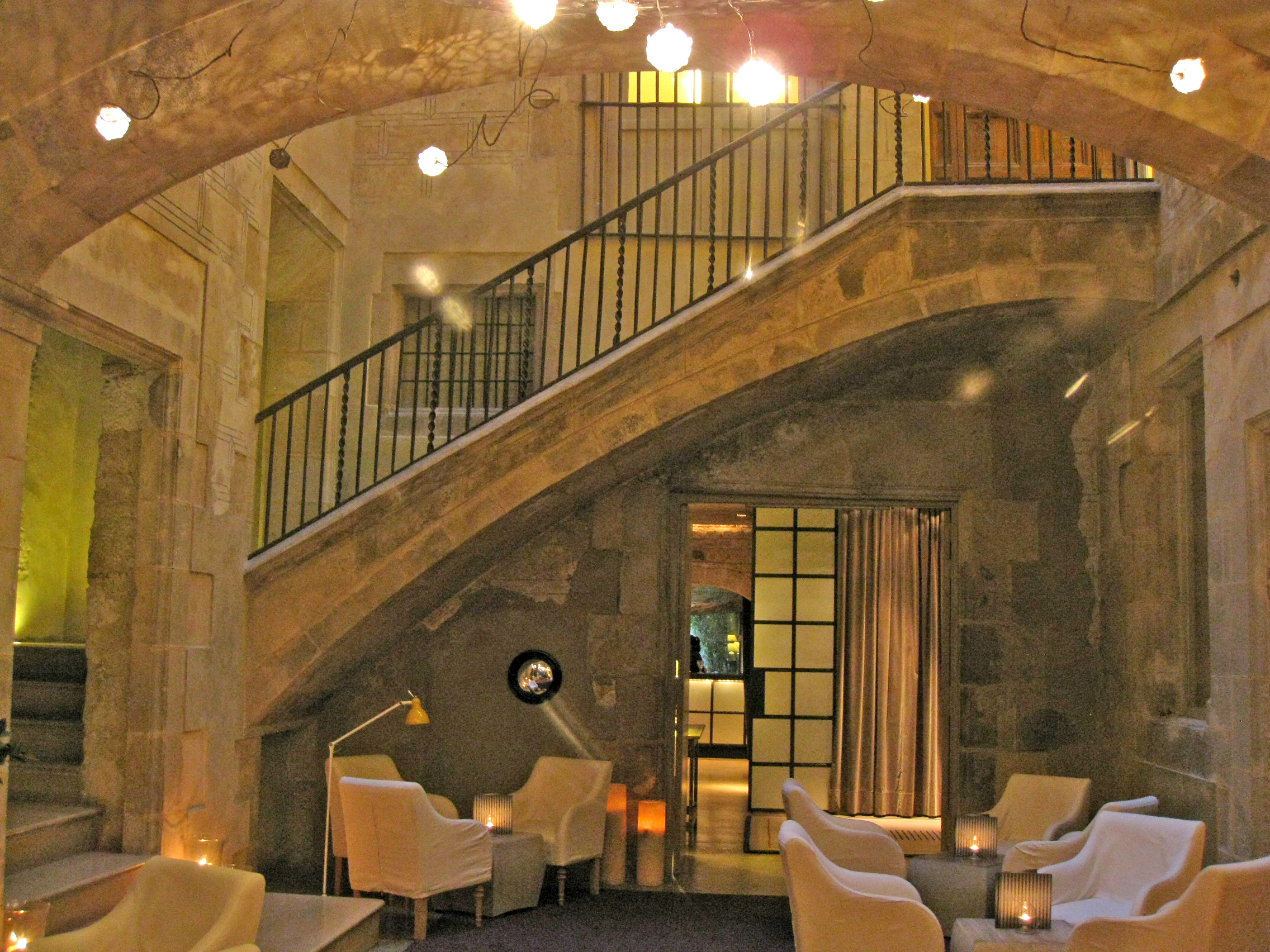 Casa Gironella, conjunt d'edificis del segle XVIII, avui convertits en hotel, amb façanes als carrers de Sant Sever i Sant Felip Neri i a la plaça de Sant Felip Neri. A la imatge, el pati del carrer de Sant Sever, que funciona com a vestíbul de l'hotel Neri.